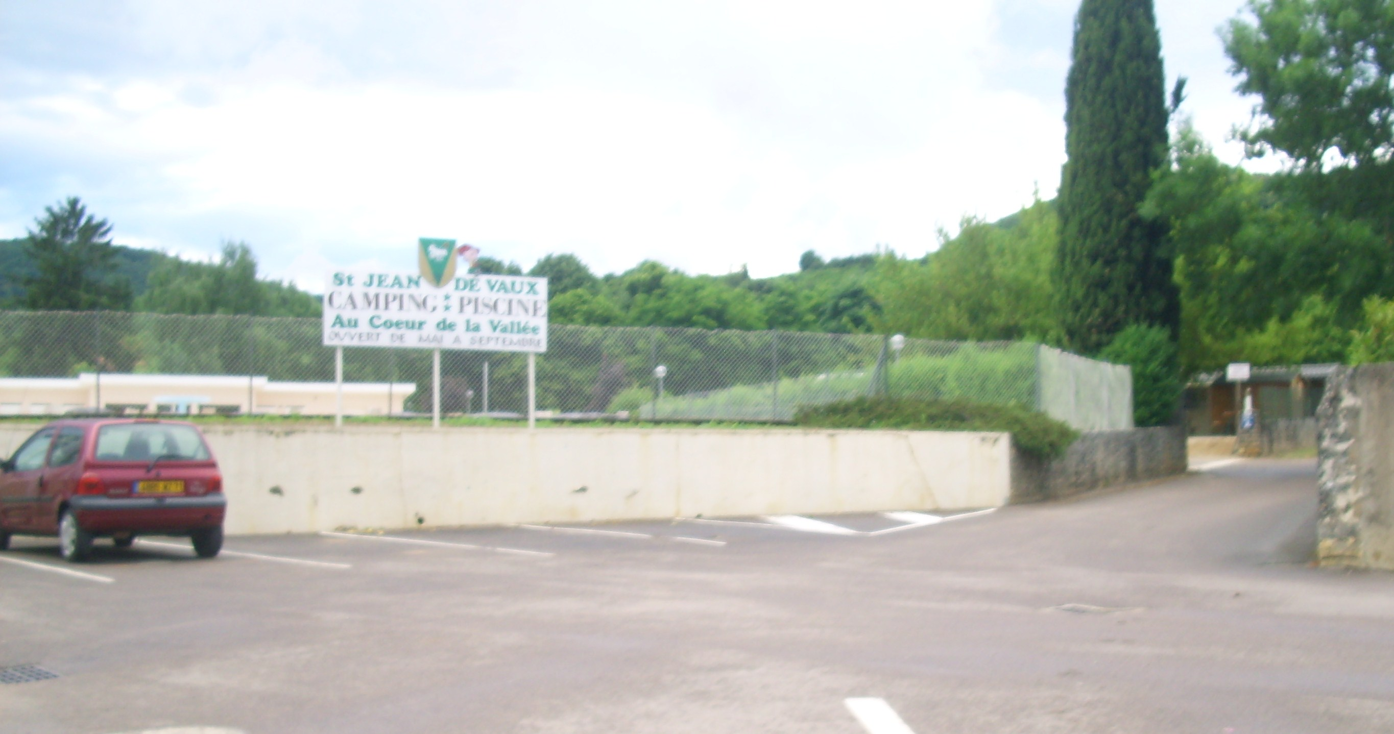 Devant et entrée du Camping-Piscine de SAint-Jean-de-Vaux (71)